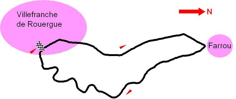 Circuit de Farrou, Aveyron, France